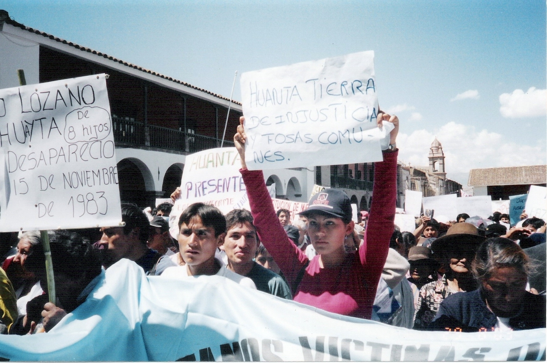 Familiares de desaparecidos durante el conflicto armado durante la presentación de la Comisión de la Verdad y Reconciliación en Ayacucho (2003).